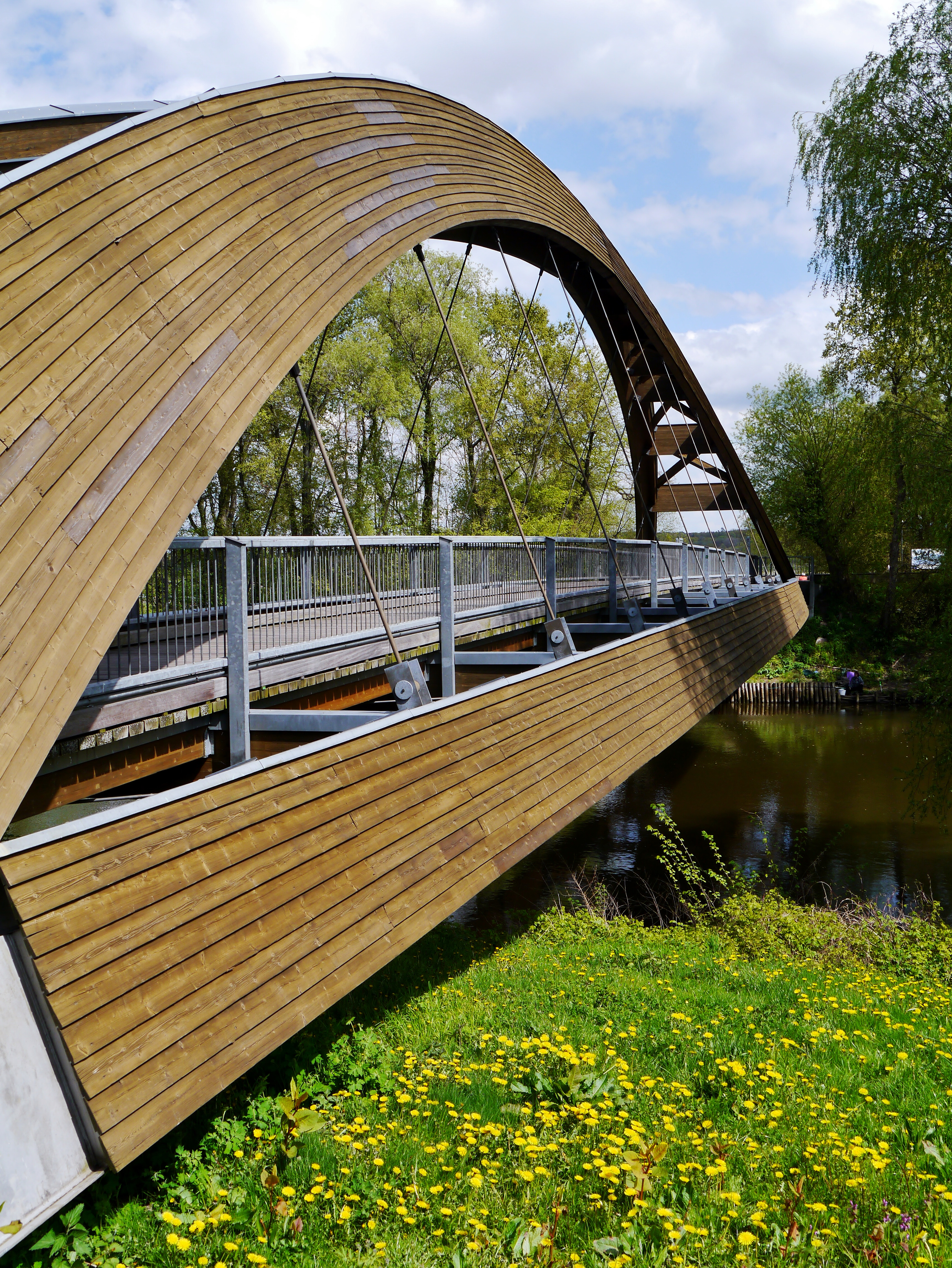 Eine Grünanlage mit Farnen auf der Insel Ziegenwerder - Europagarten 2003 - in Frankfurt an der Oder in Brandenburg.